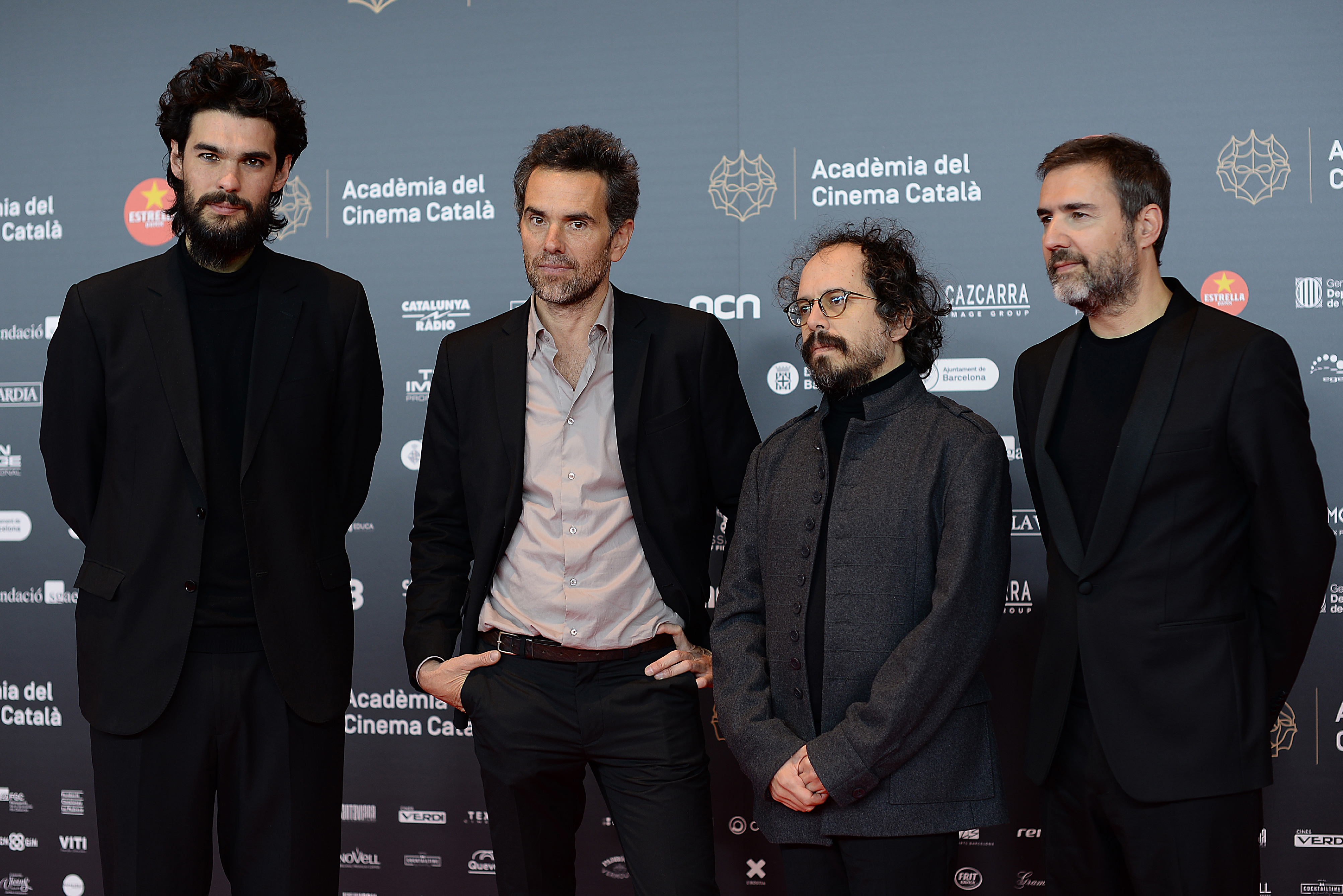 Óliver Laxe, director; Mauro Herce, fotografia; Santiago Fillol, guionista, i Xavier Font, productor (O que arde), XII Premis Gaudí (2020)